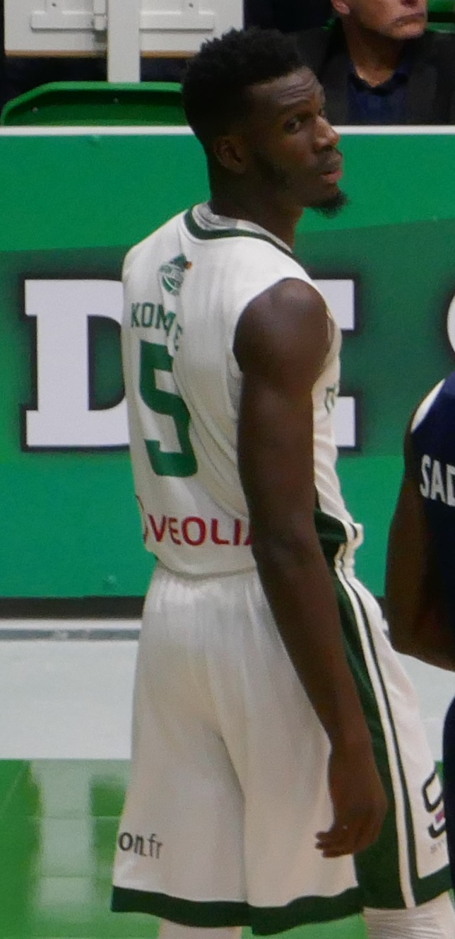 Lahaou Konate avec Nanterre 92